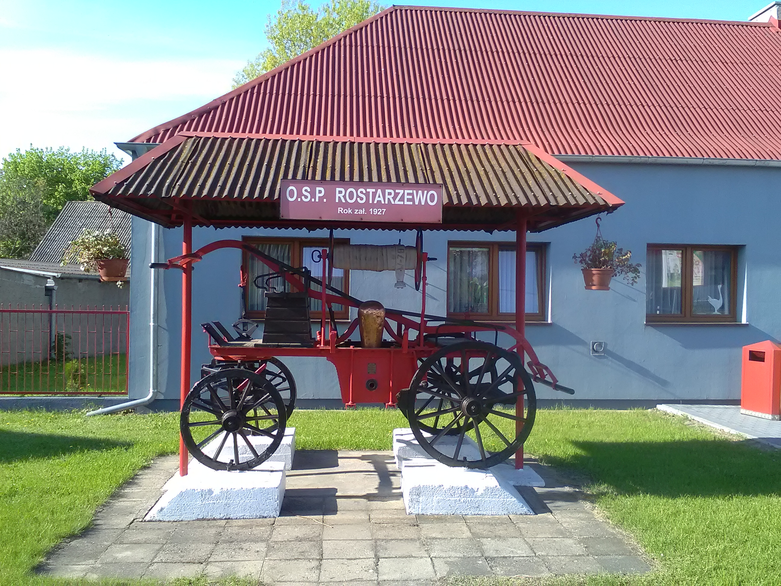 Ochotnicza straż pożarna w Rostarzewie.